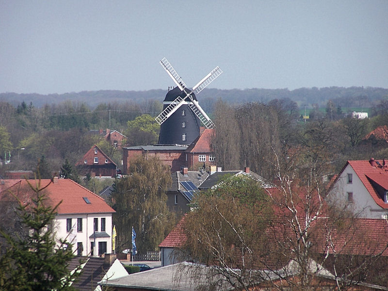 die Seemühle in Woldegk, größte Windmühle in Mecklenburg-Vorpommern